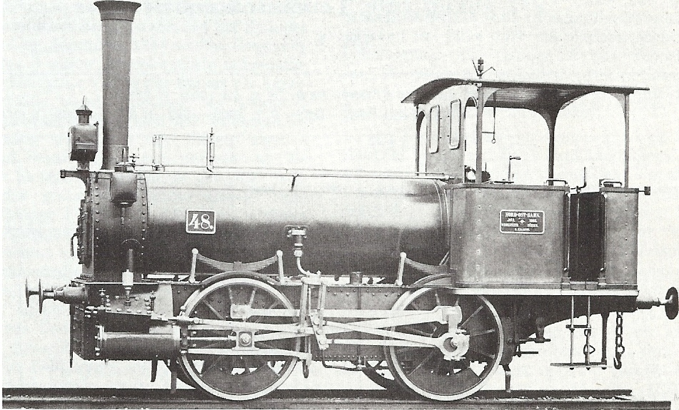 Dampflokomotive E 2/2 Nummer 48 der schweizerischen Nordostbahn